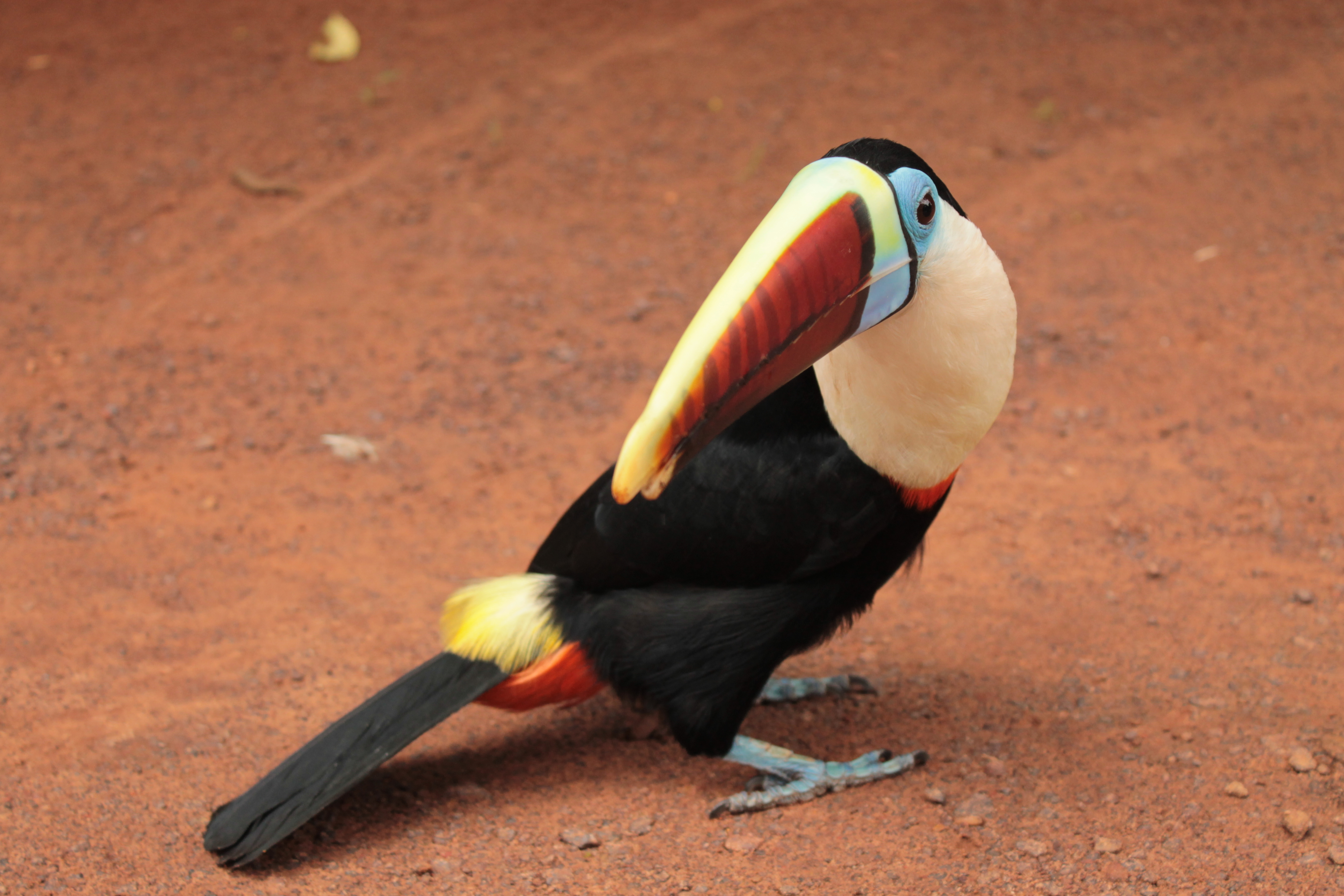 Tucán llamado Tuki.